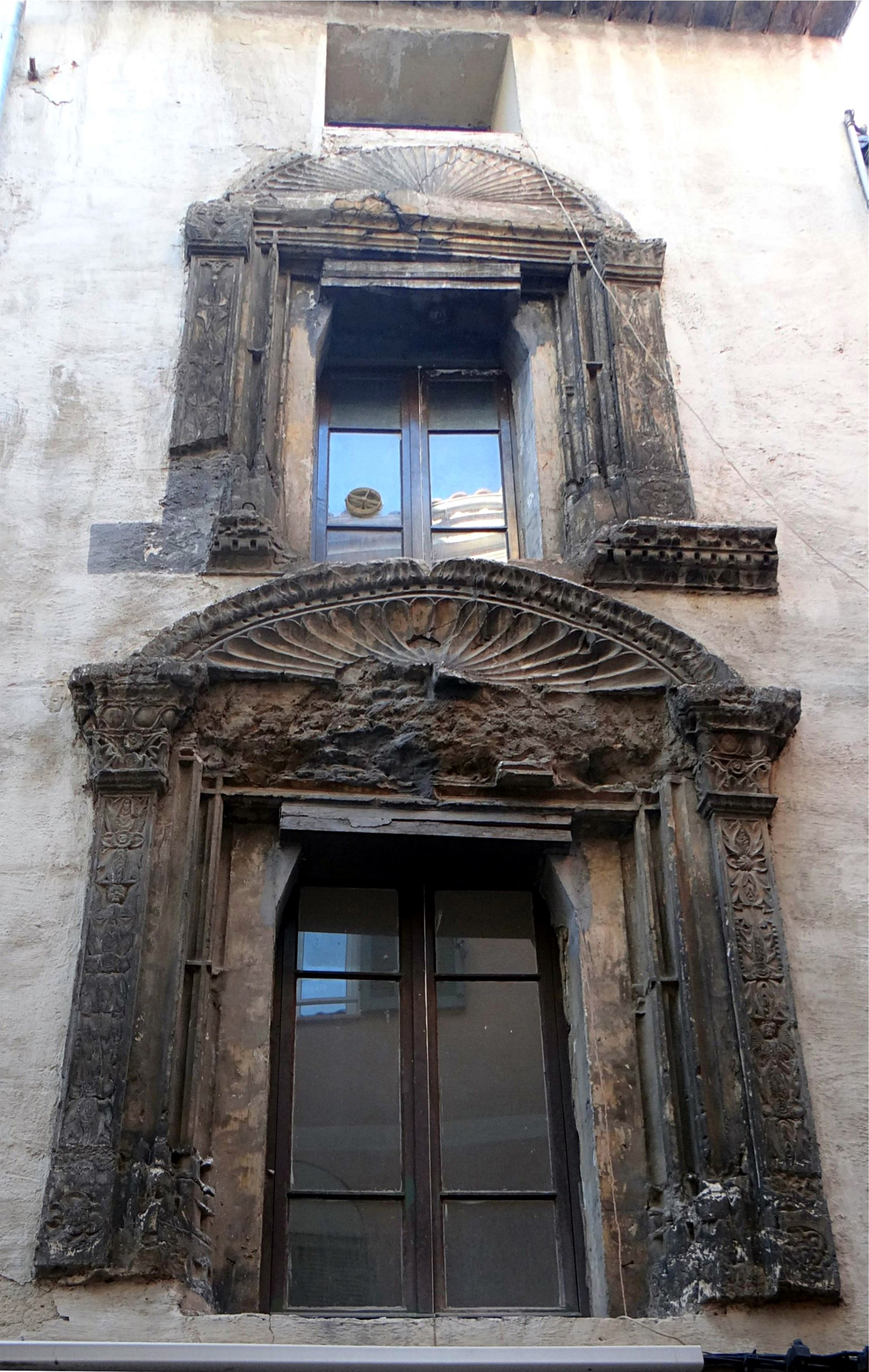 La maison du complot, ancienne demeure de Nicolas de Bausset, Aubagne, Bouches-du-Rhône, France.